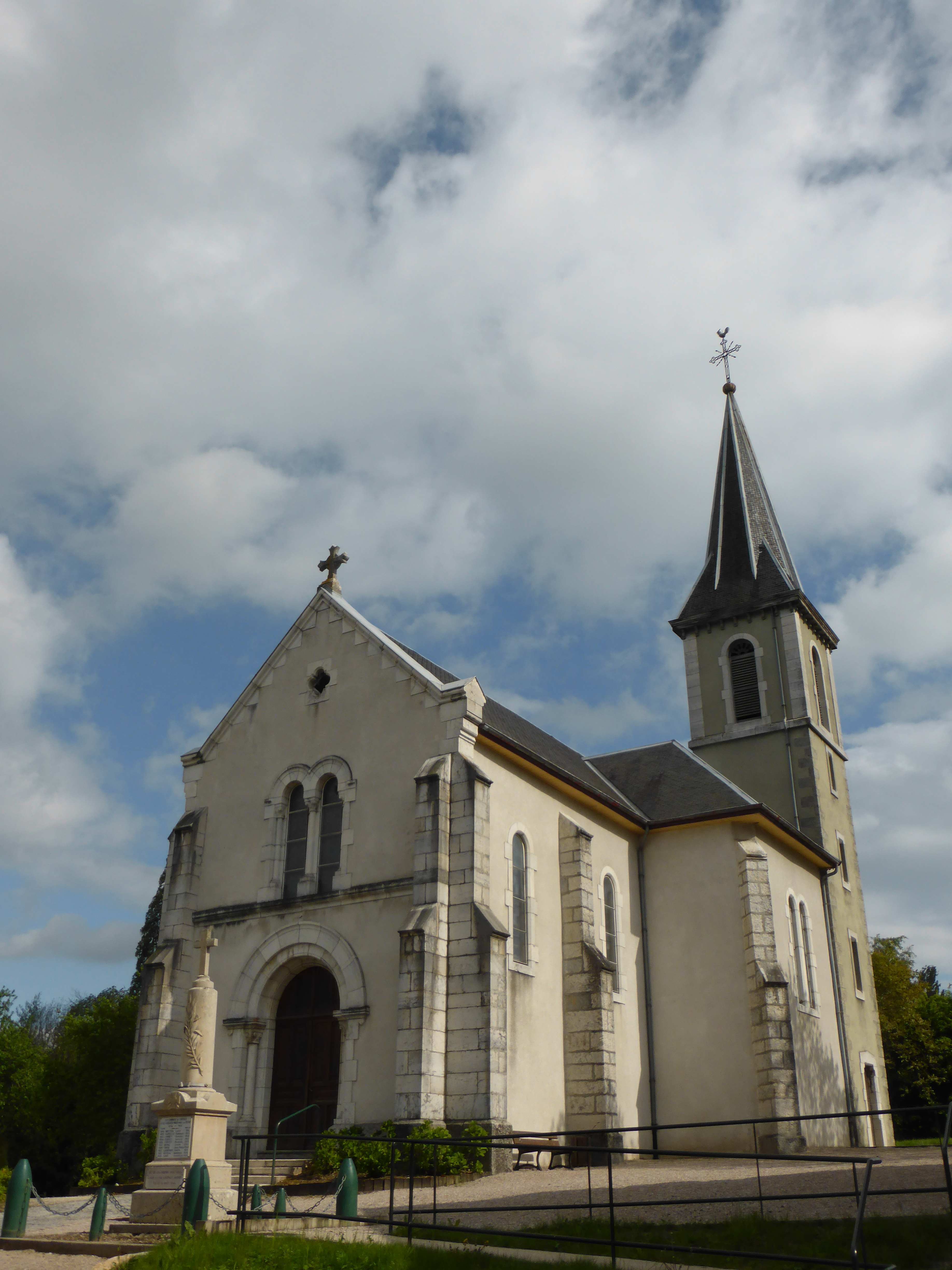 Église Assomption-de-Marie de Chênex, en Haute-Savoie.